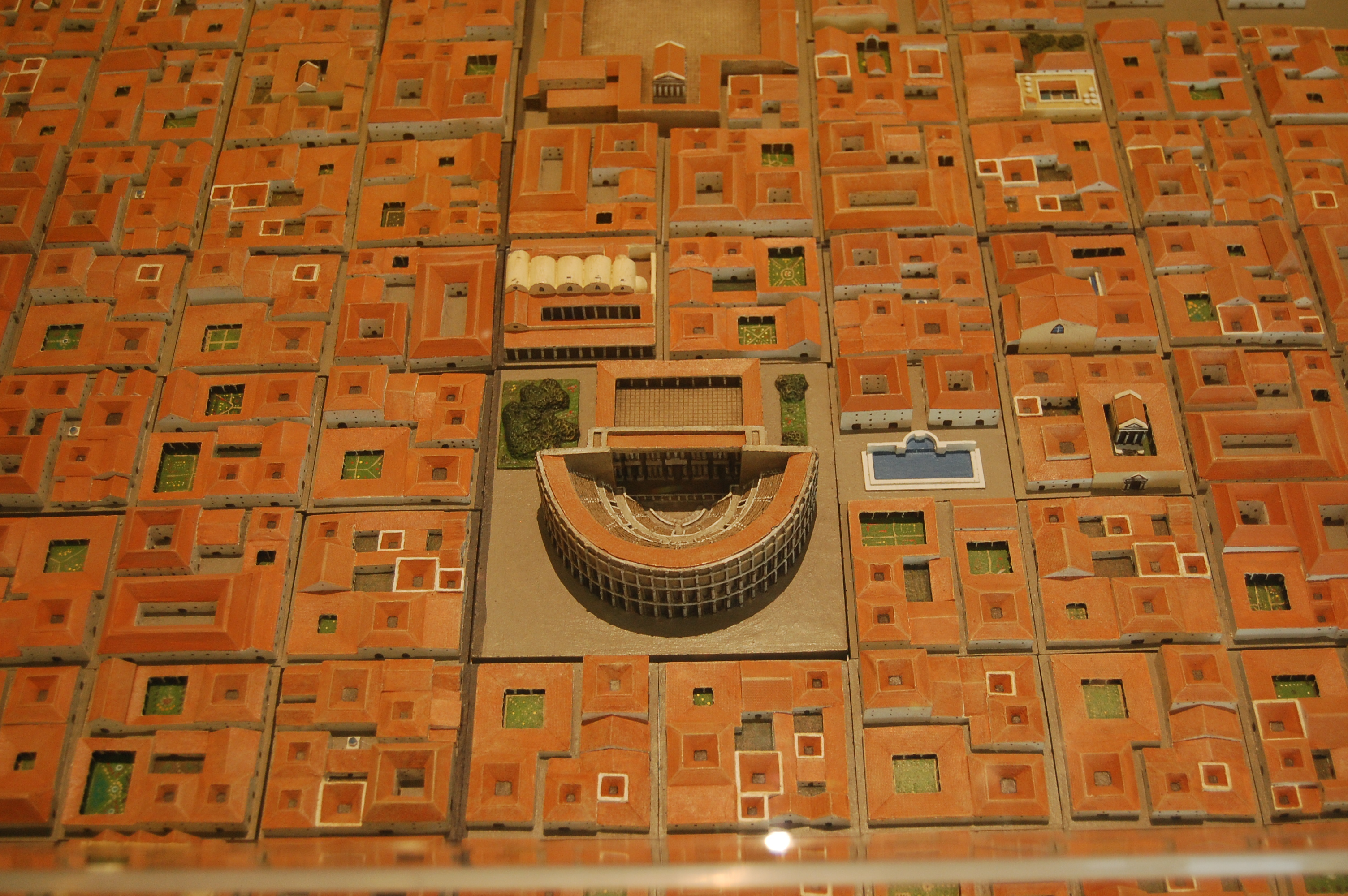 Museo del Teatro Romano de Caesaraugusta